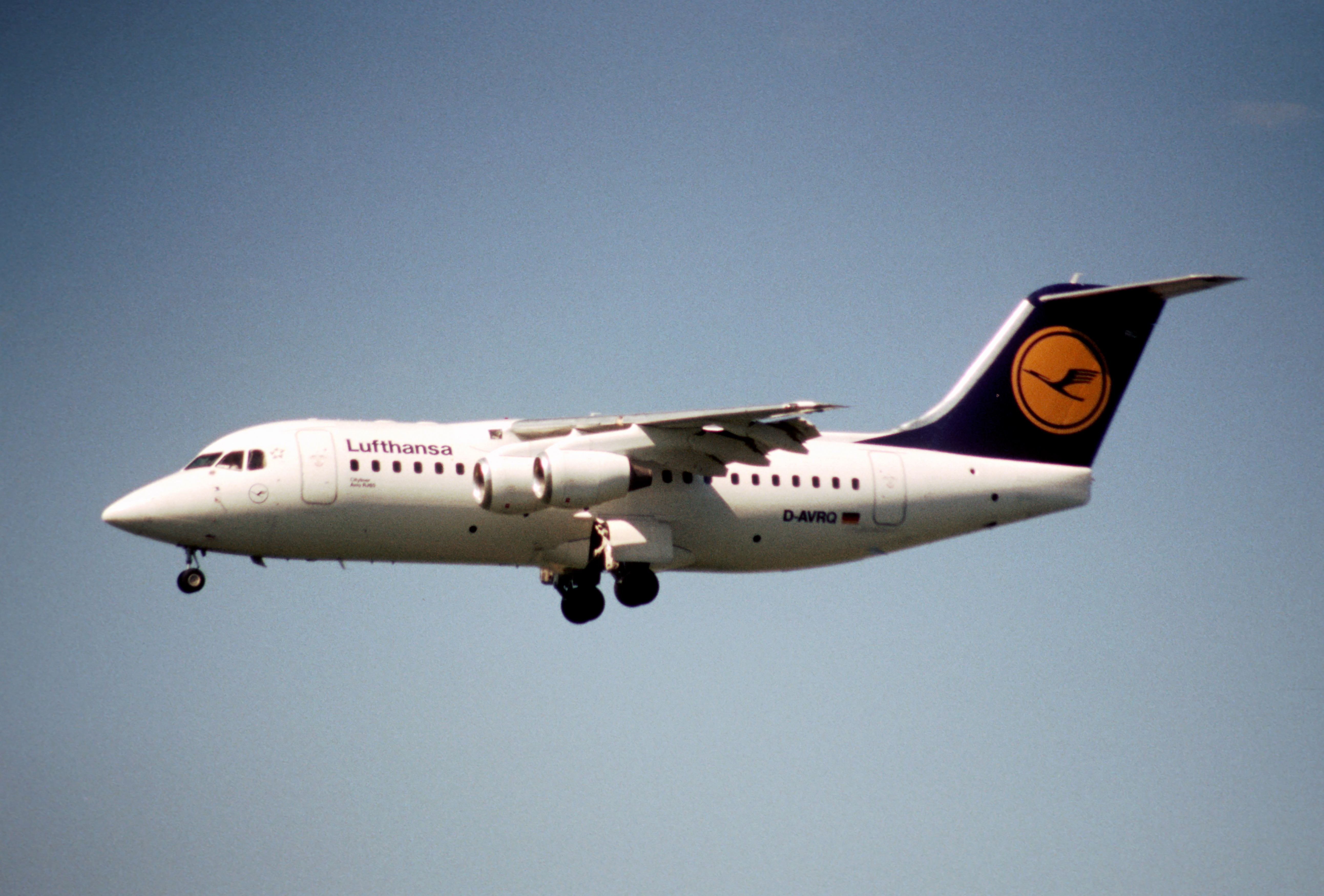 101bw - Lufthansa Avro RJ 85; D-AVRQ@ZRH;01.08.2000